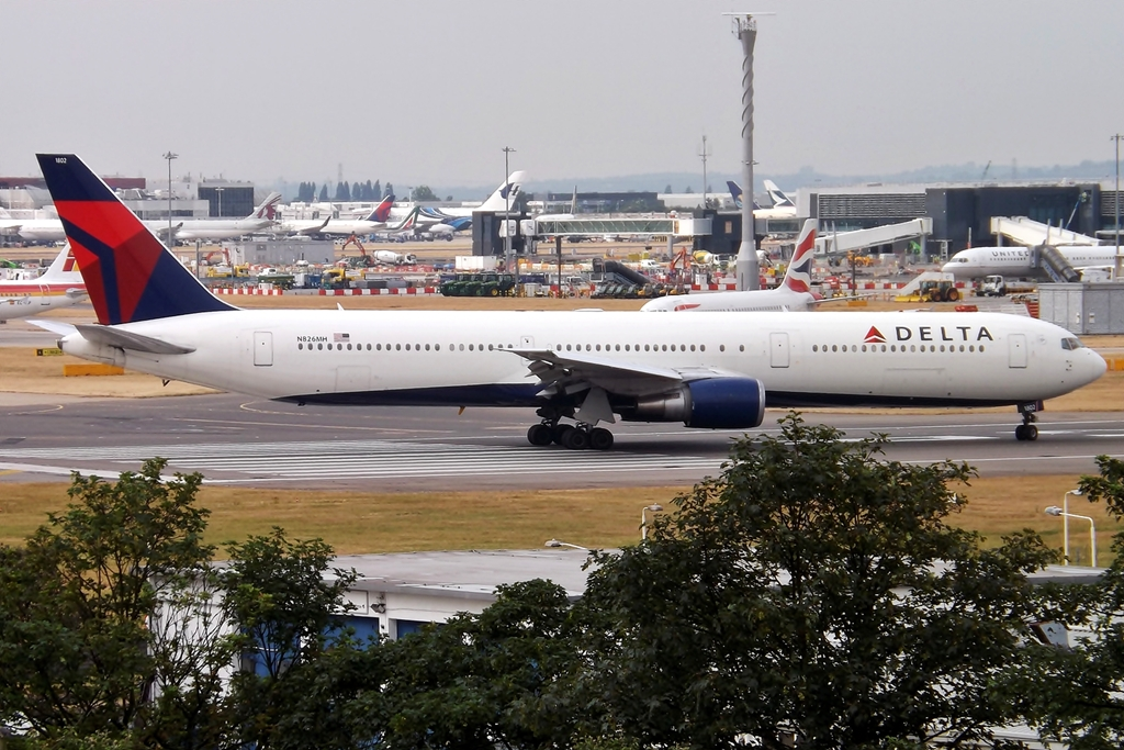 N826MH Boeing 767-400 Delta